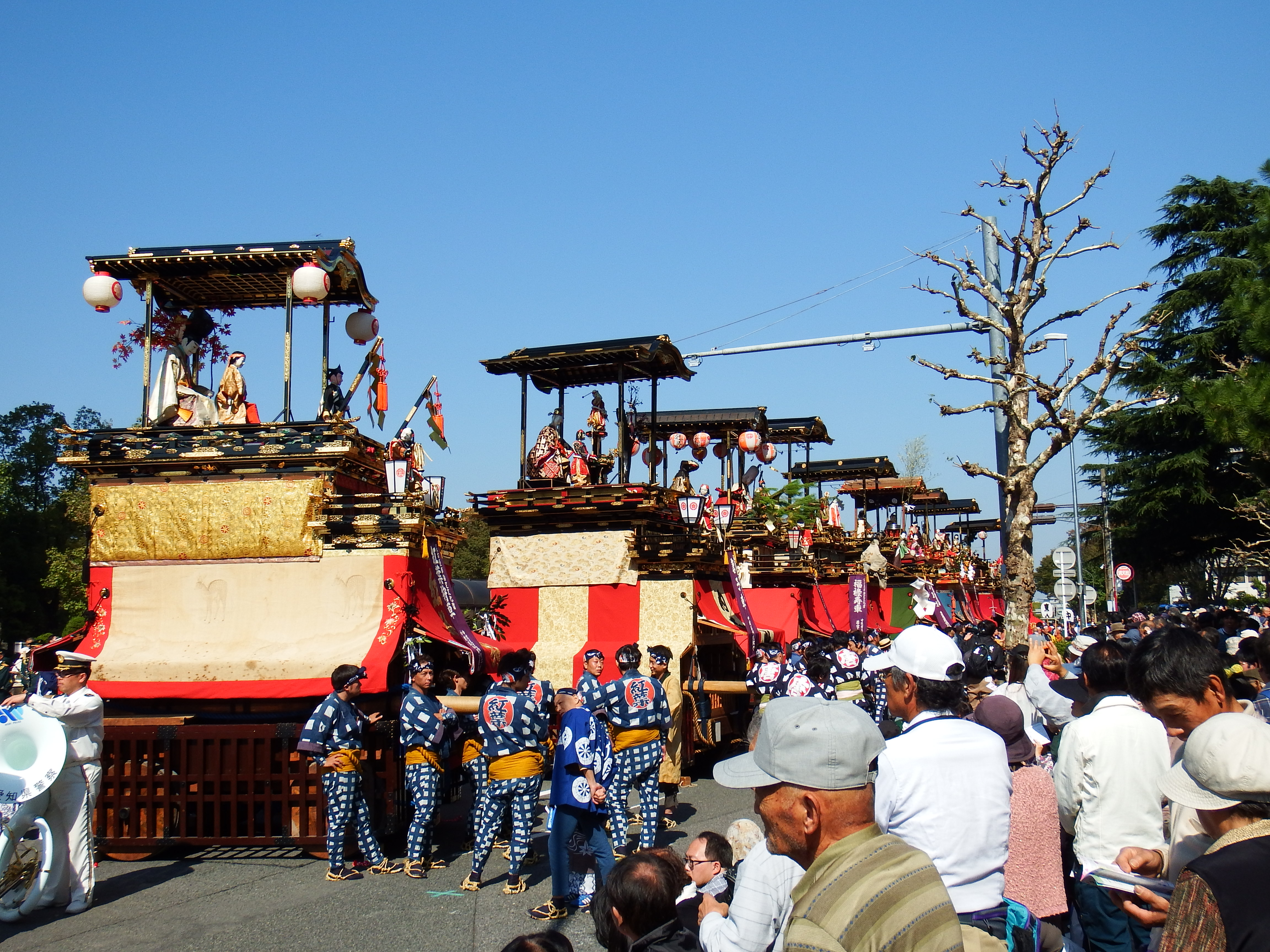 名古屋まつり